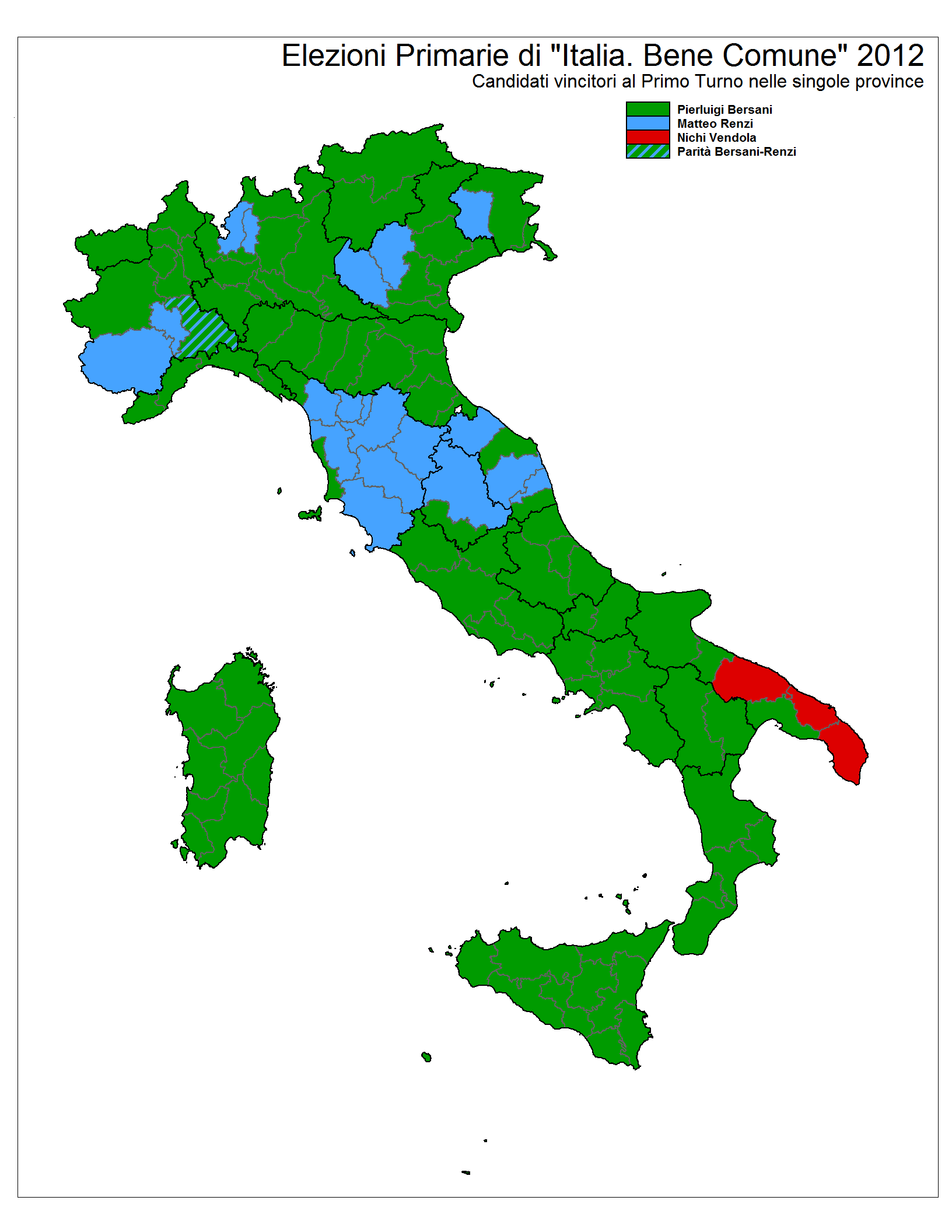 Candidati vincitori nelle singole province nel I Turno delle Elezioni Primarie di Italia Bene Comune del 2012.